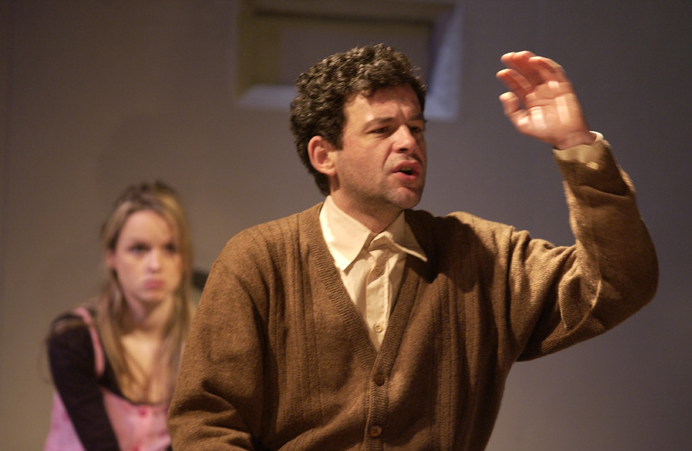 Nebojša Glogovac u predstavi Hadersfild